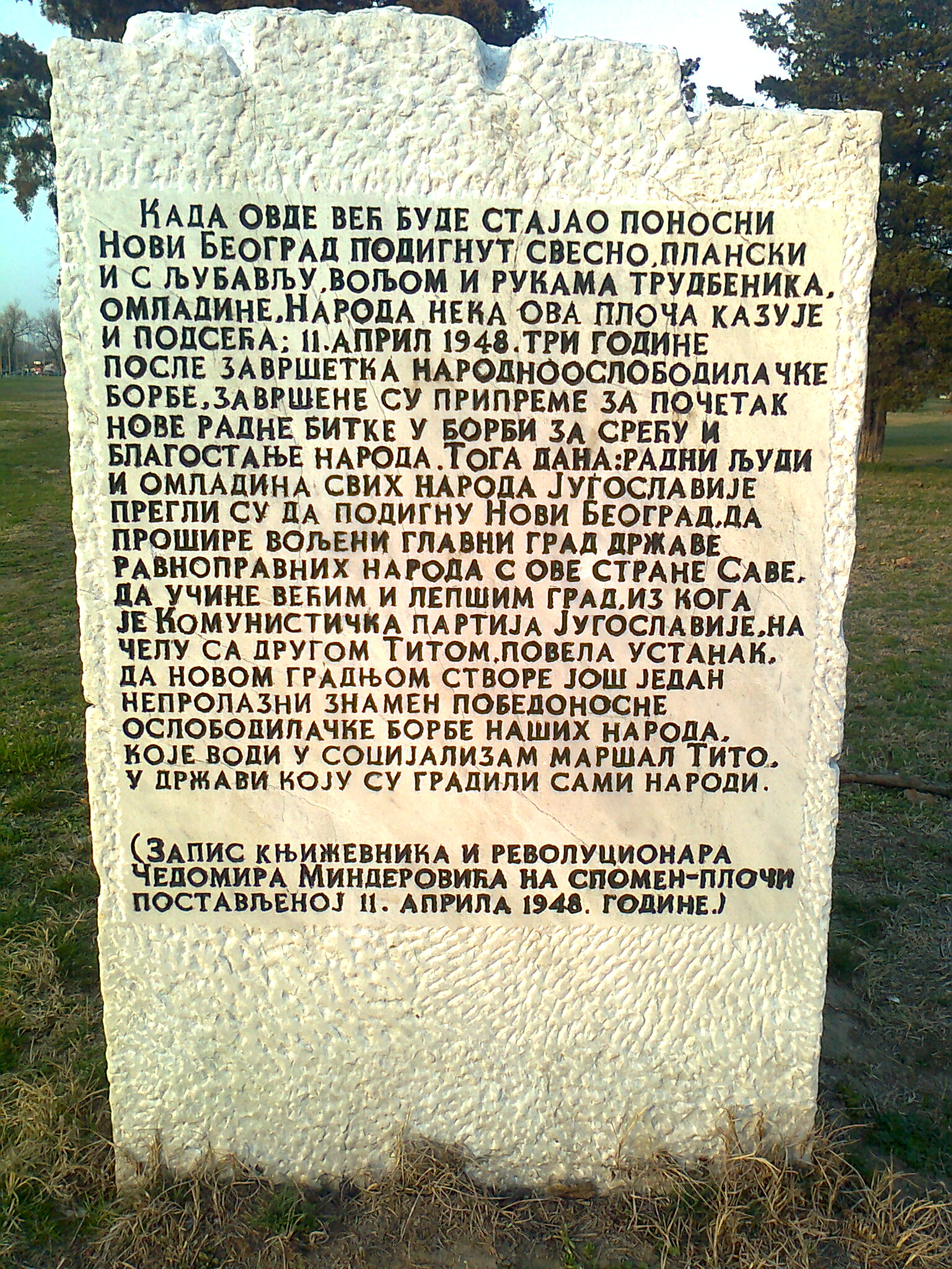 Spomen obeležje početka gradnje Novog Beograda.